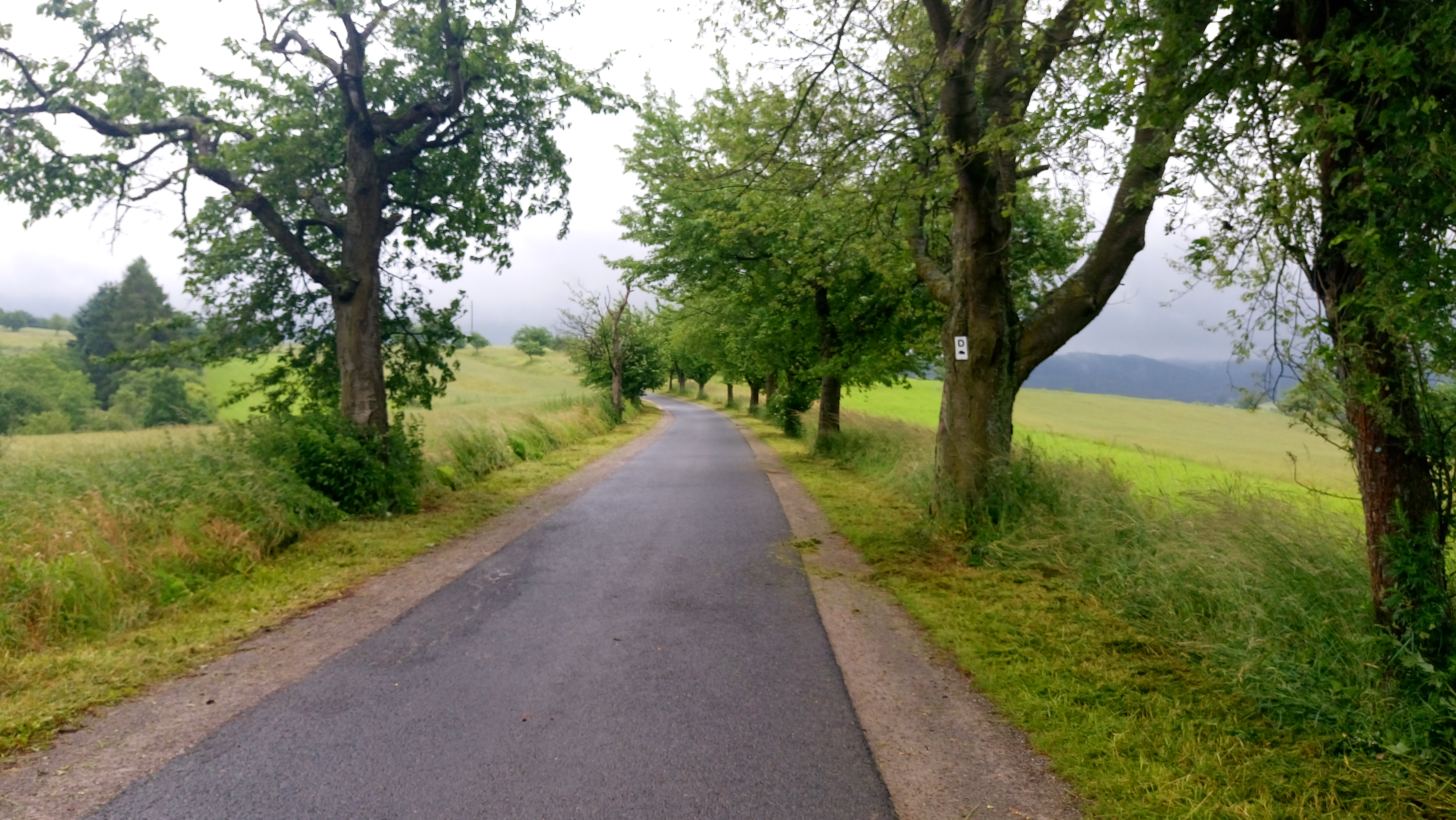 Der Degen-Weg bei Rappach